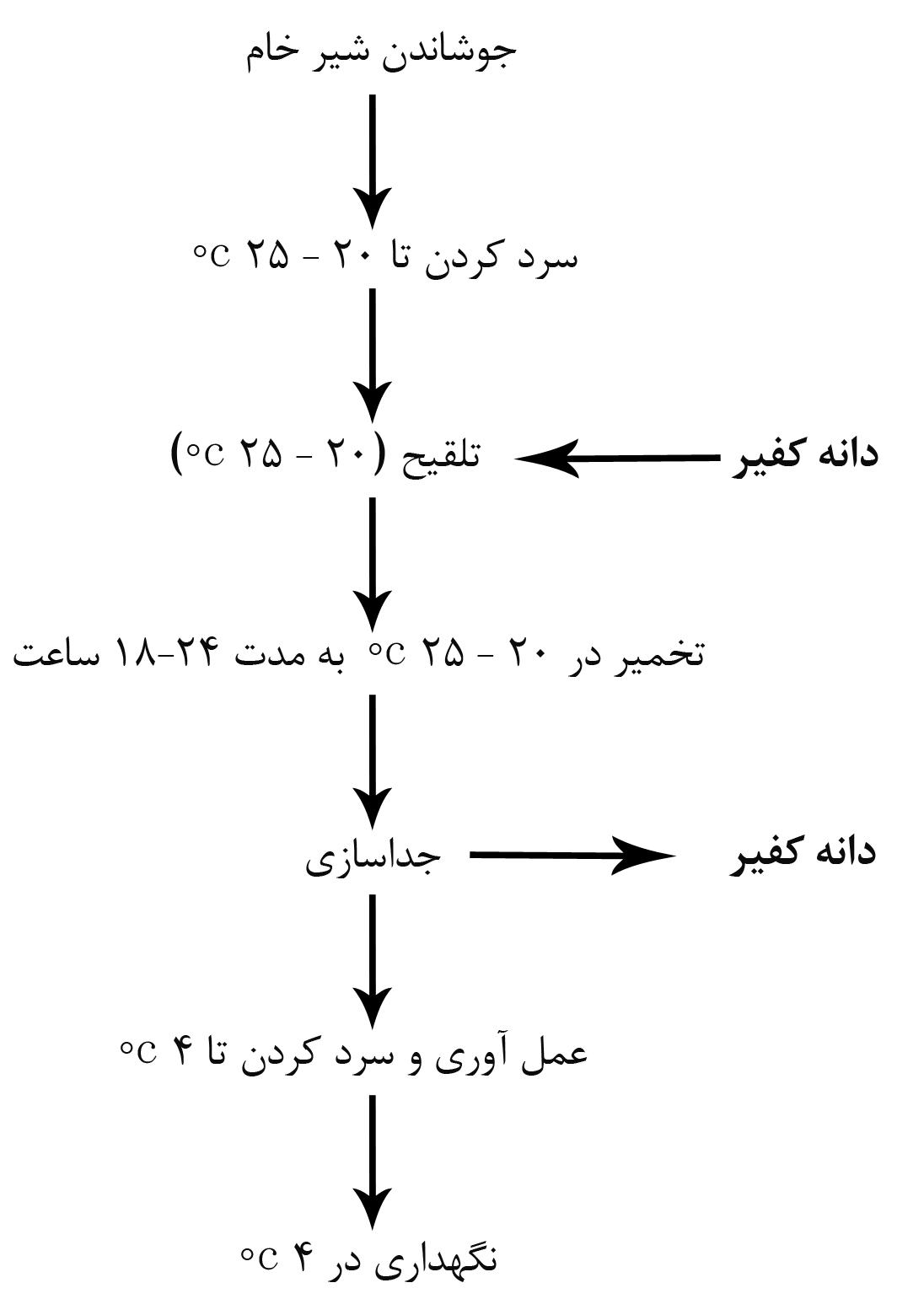 فراوری_سنتی_کفیر